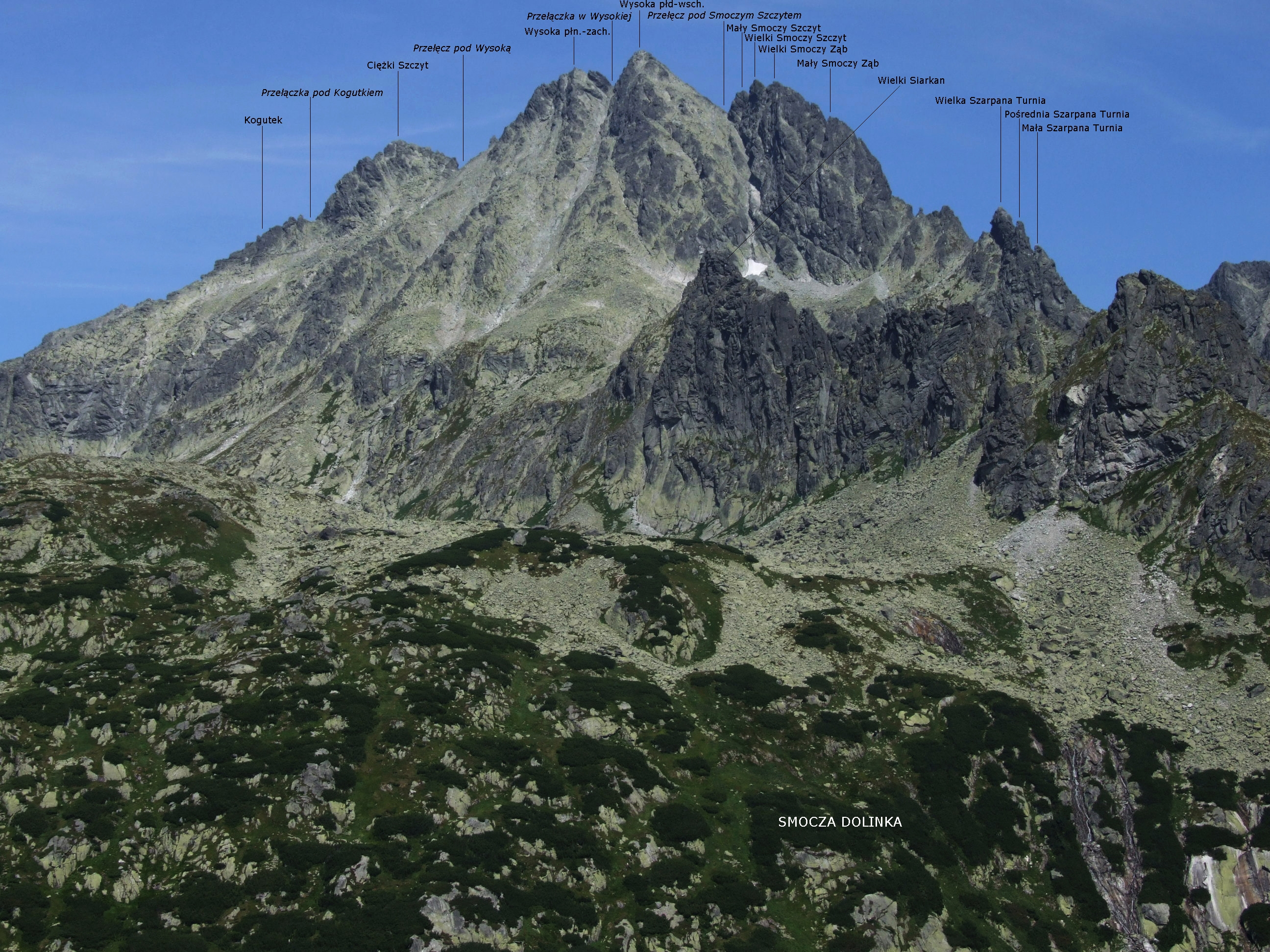 Widok od południowej strony